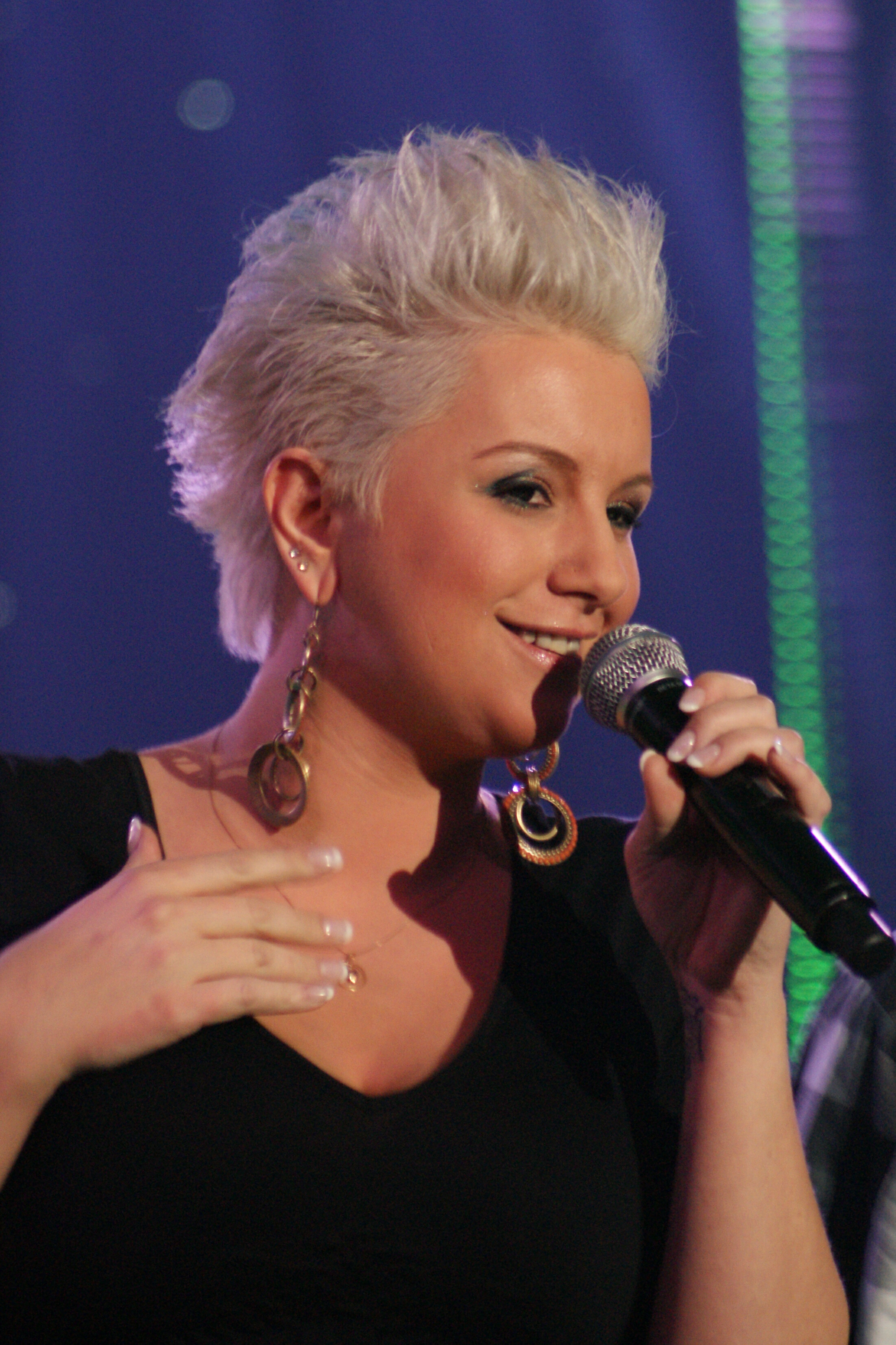 Zosia Karbowiak podczas Krajowych Eliminacji do Konkursu Piosenki Eurowizji, 14 lutego 2010.